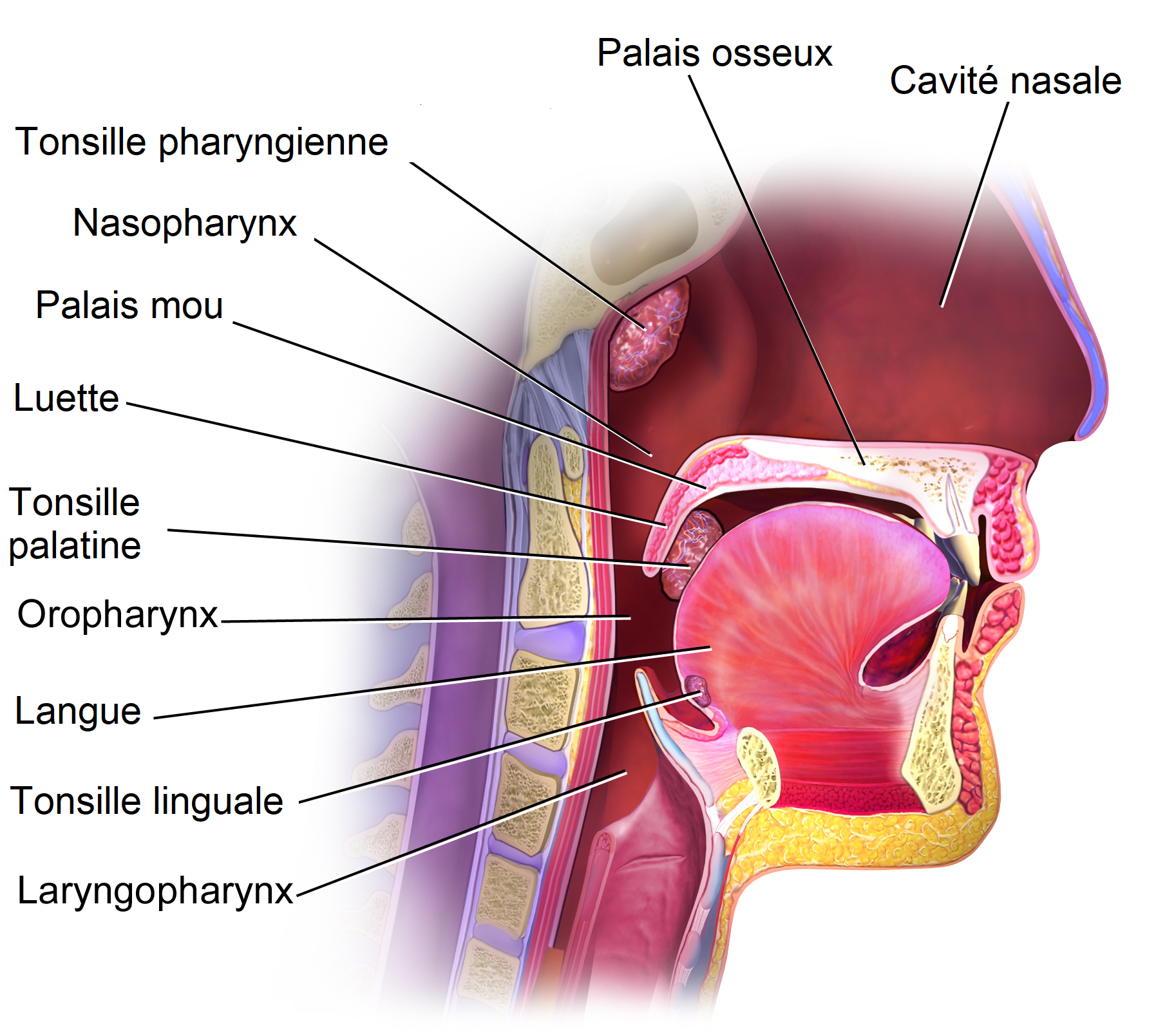 Localisation des principales tonsilles